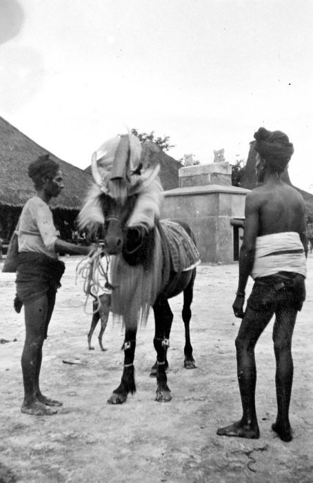 Repronegatief. Een versierd paard van de overleden vorst, dat voorheen bij de begrafenis geofferd moest worden, Rendeh-Mangili, Oost-Sumba